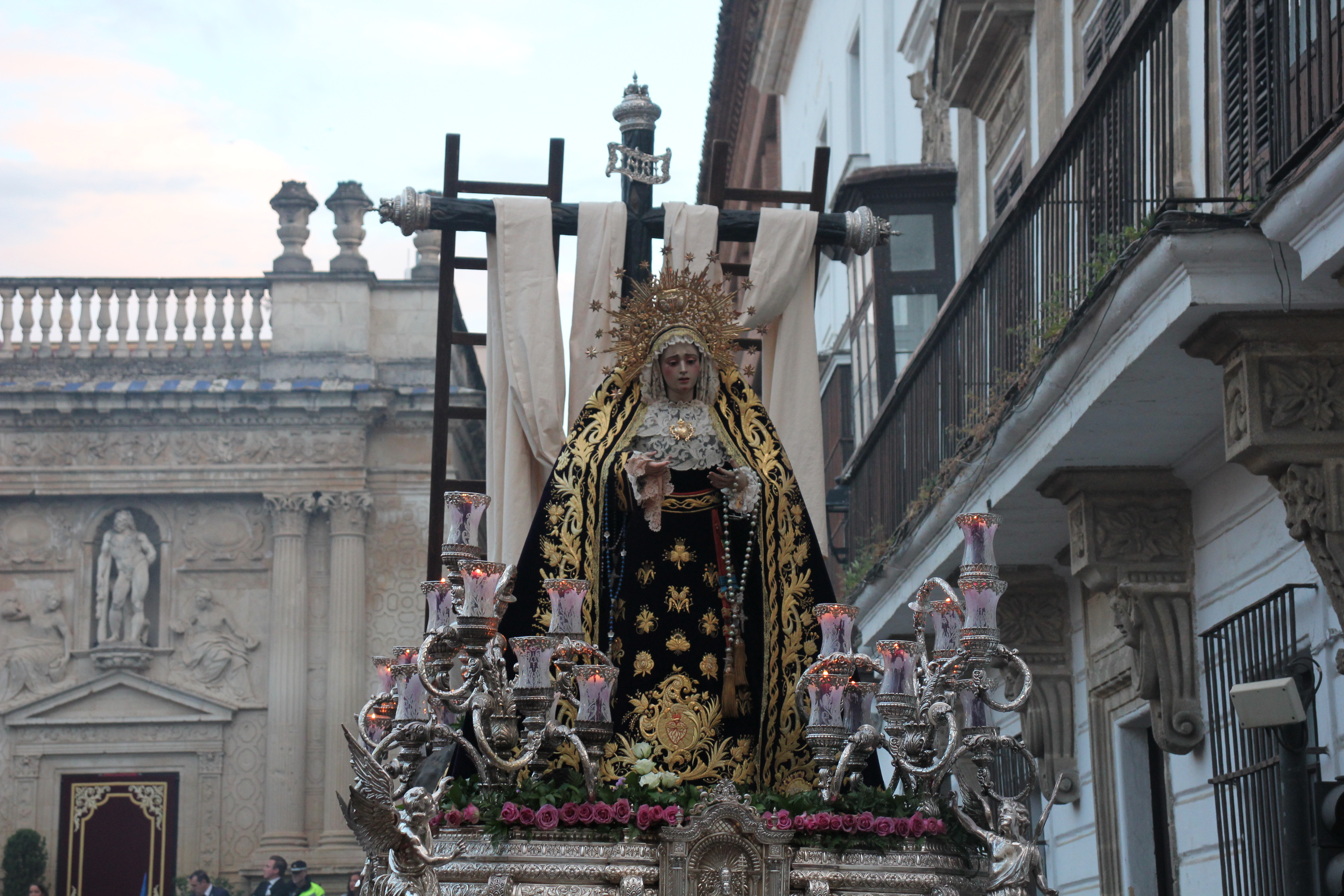 Hermandad de Loreto (Jerez)